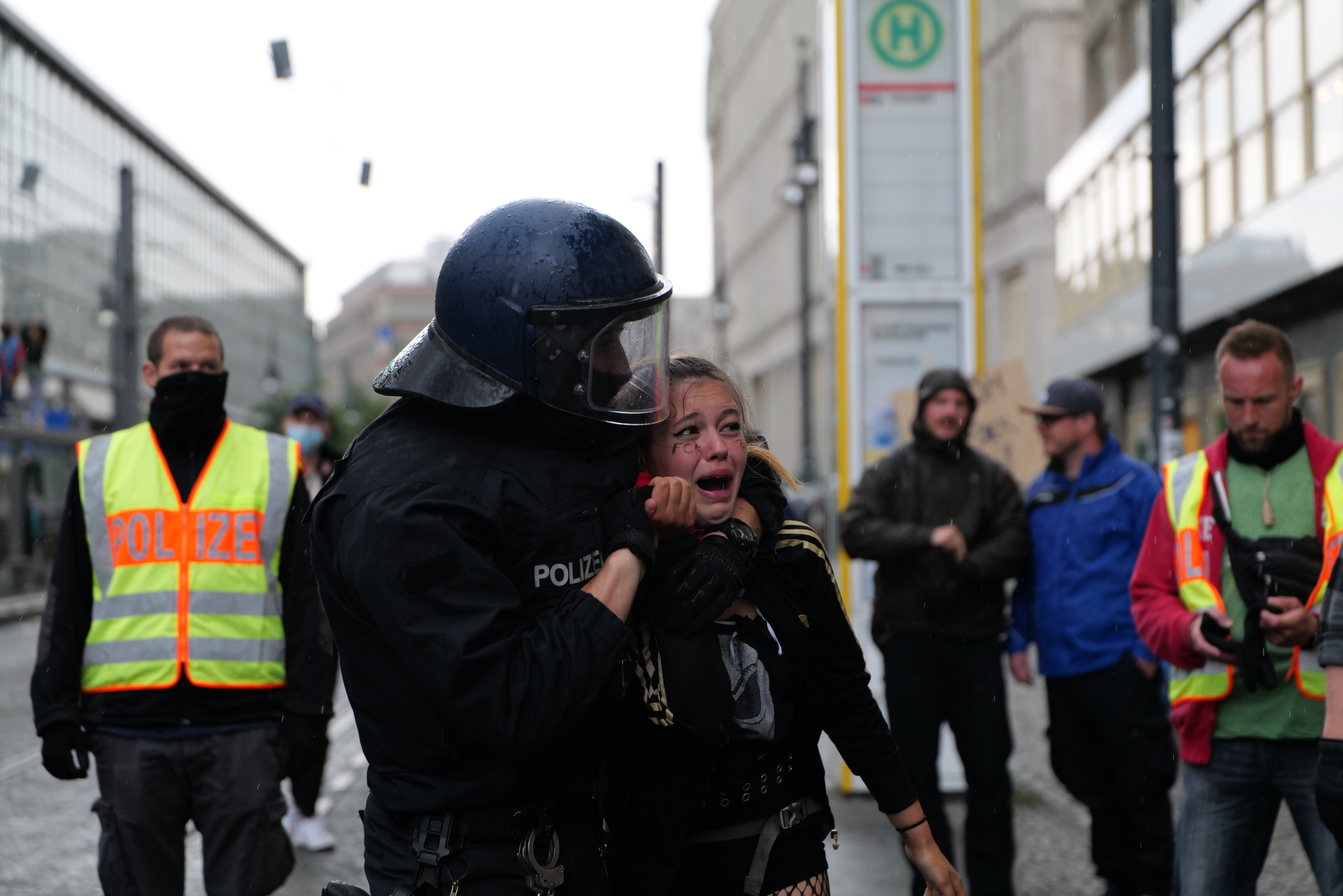 BlackLivesMatter Kundgebung am Alexanderplatz in Berlin am 6. Juni 2020.